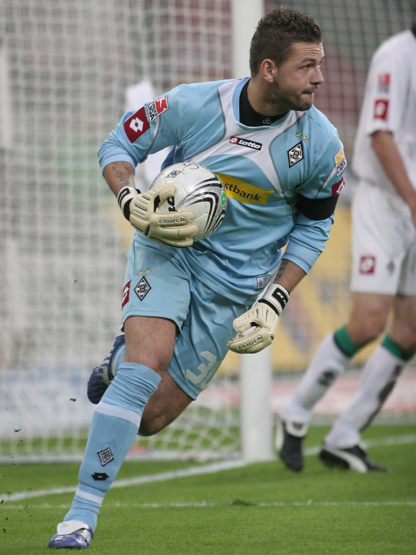 Logan Bailly, Torwart von Borussia Mönchengladbach